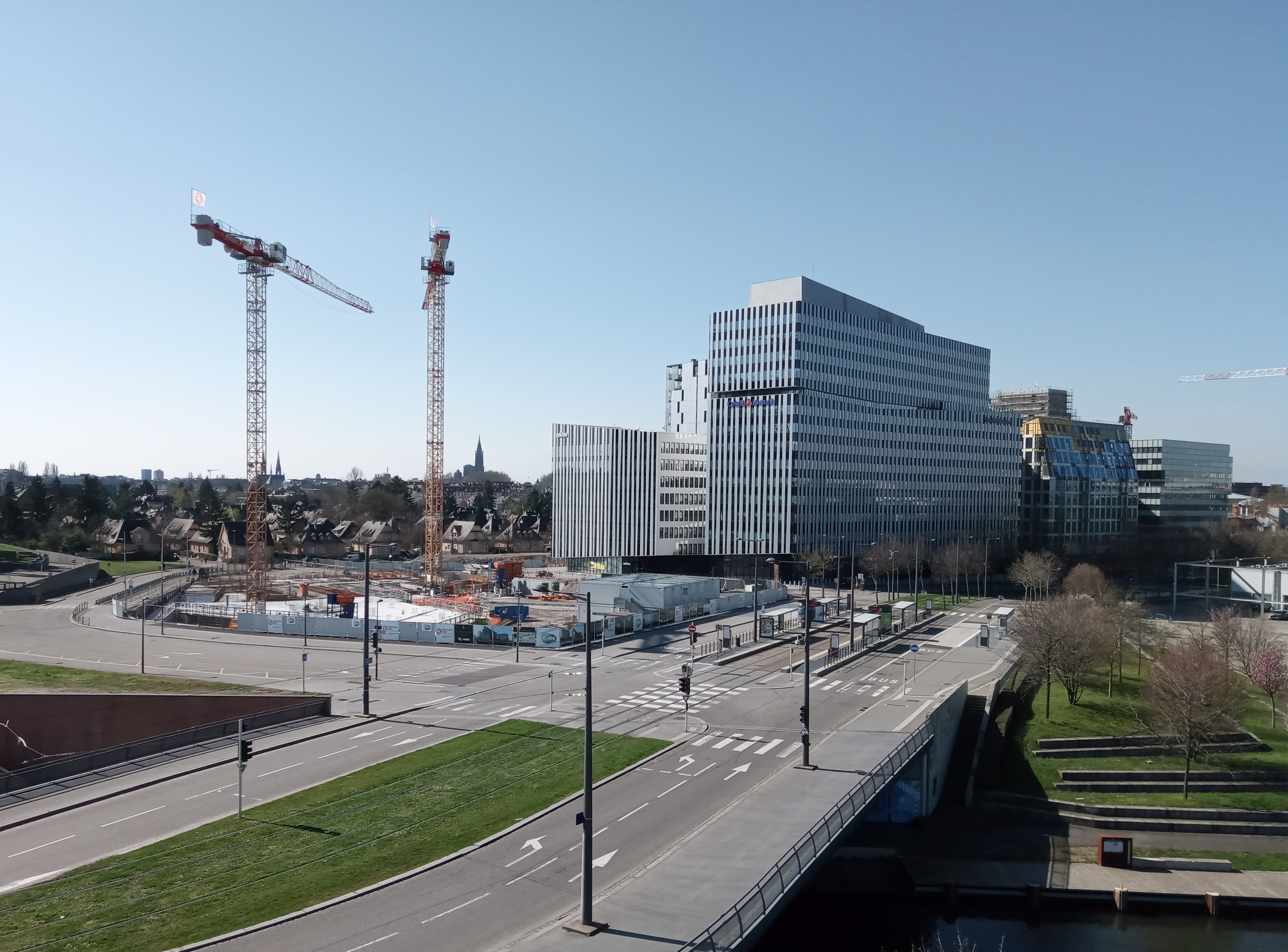 Le quartier d'affaires Archipel au Wacken à Strasbourg.